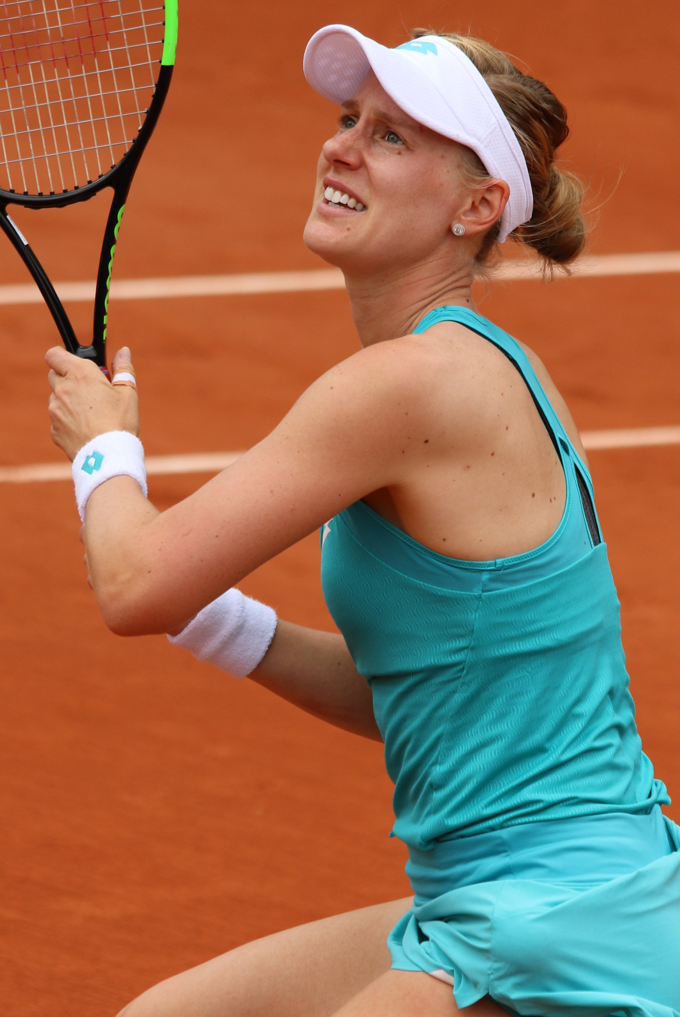 Riske RG19 (1)